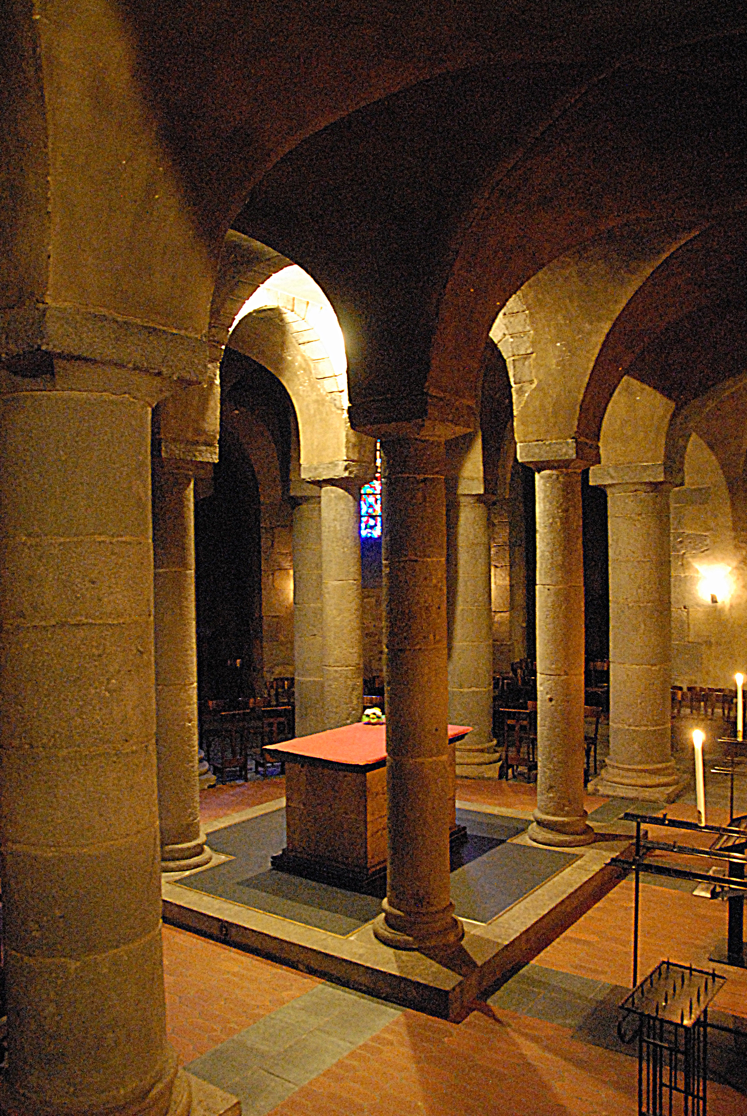 N.-Dame d'Orcival, Krypta, Mittelbereich von NW